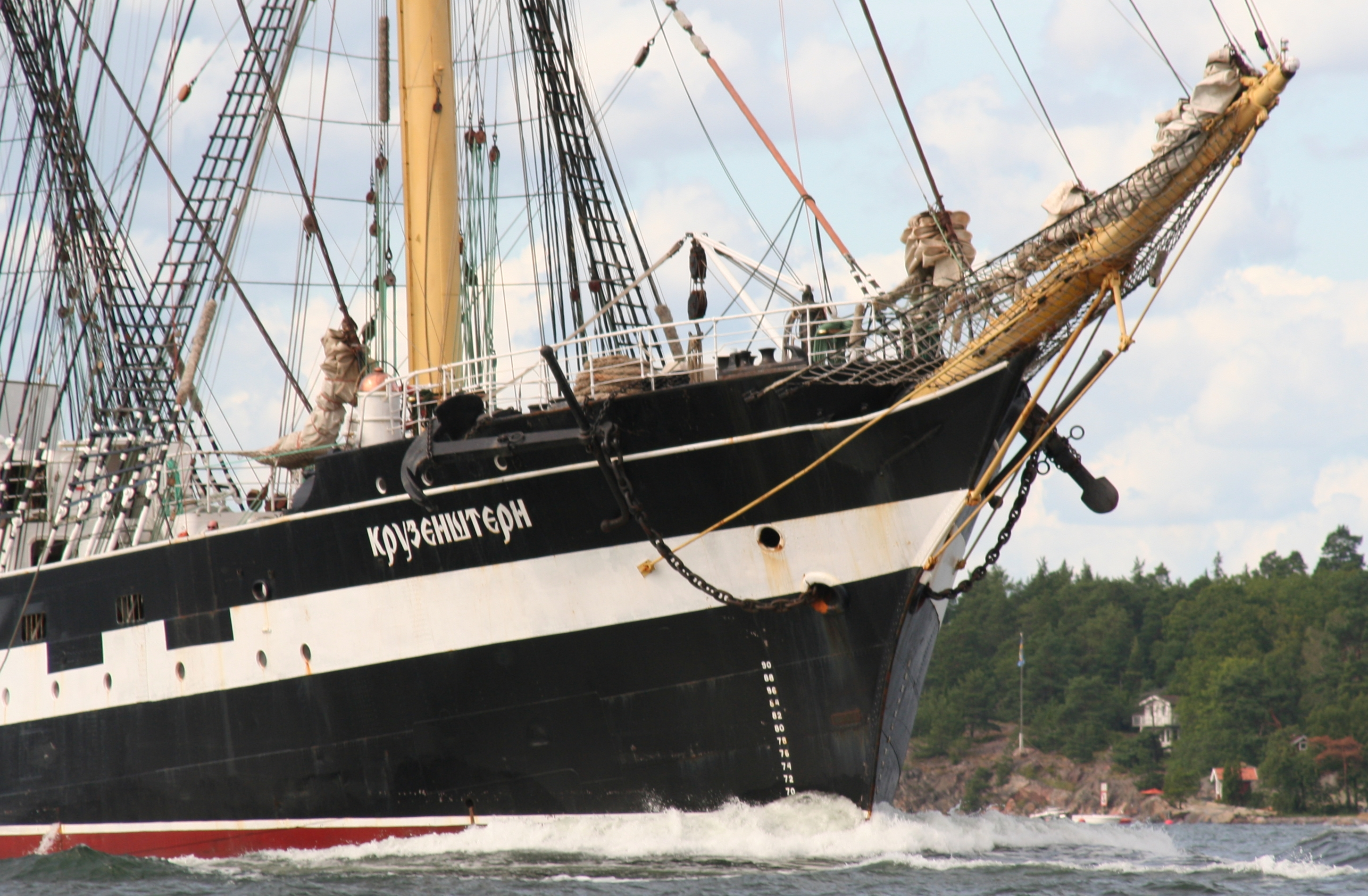 Fören på den ryska barken Kruzenshtern.